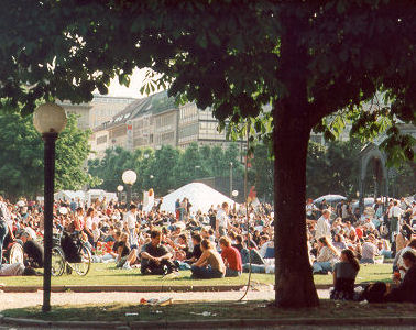 Deutscher Evangelischer Kirchentag in Stuttgart (Motto: Ihr seid das Salz der Erde.)